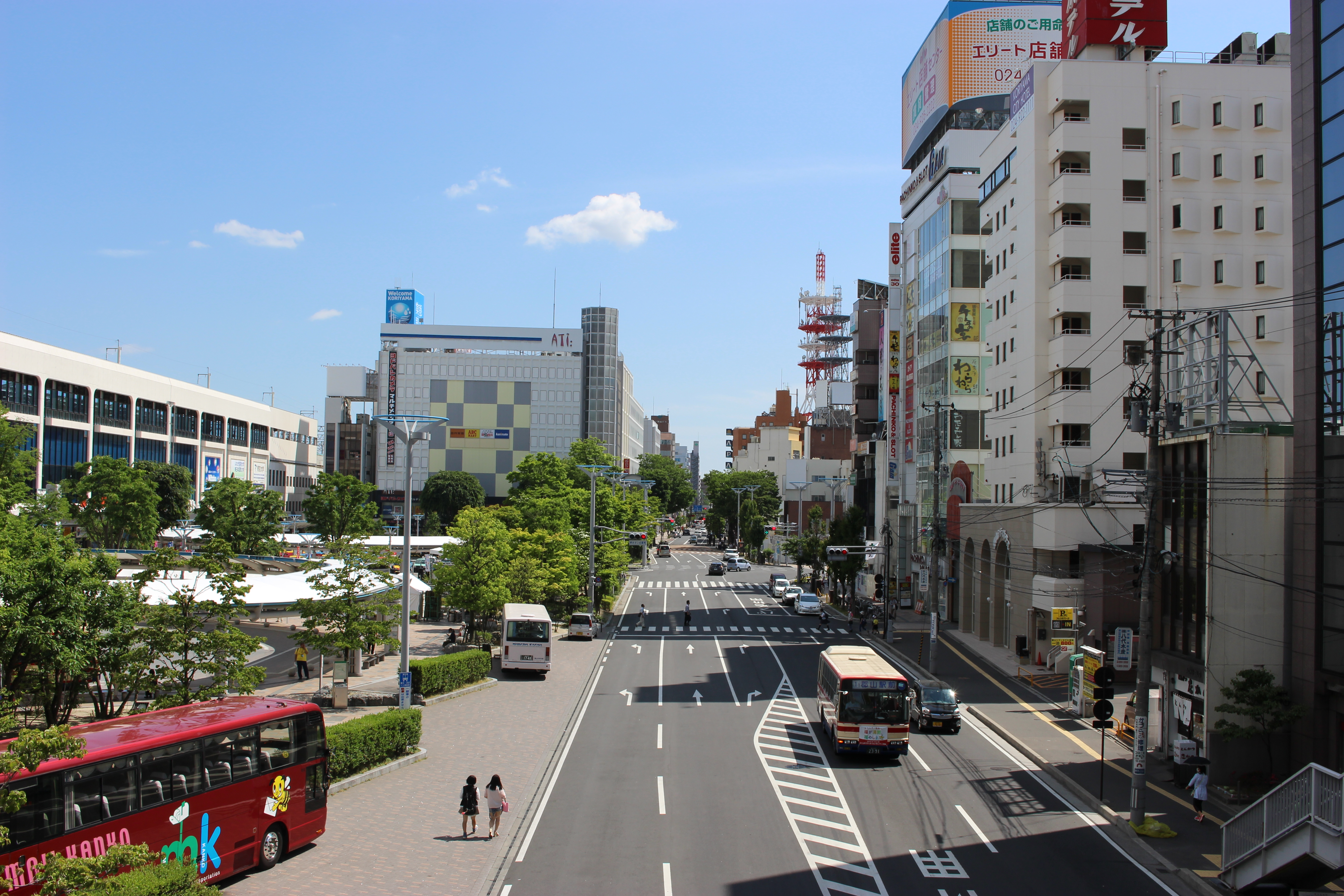 ペデストリアンデッキから望む郡山駅西口駅前広場